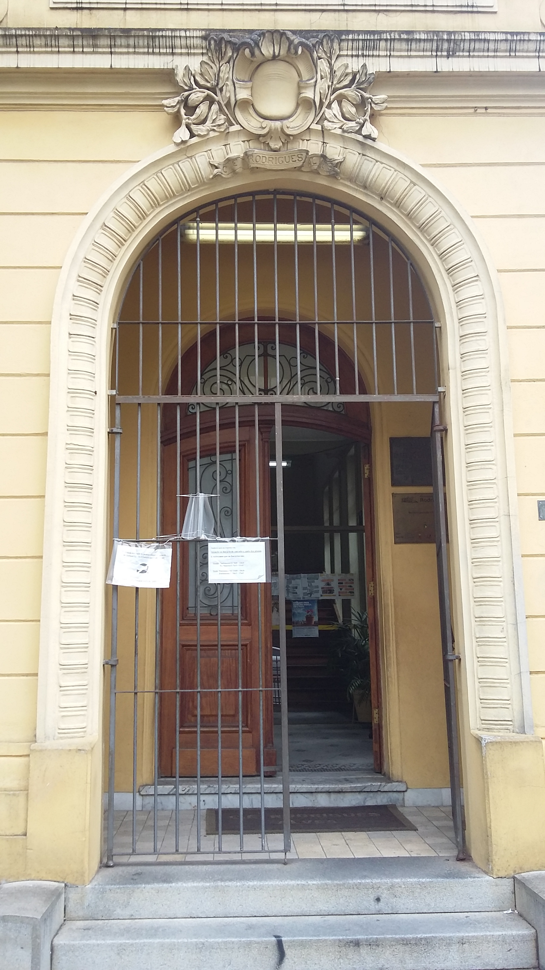 Entrada da Escola Estadual Rodrigues Alves, em São Paulo (SP), Brasil.